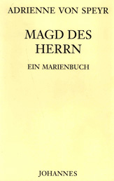 Copertina dell'edizione in lingua originale de L'ancella del Signore